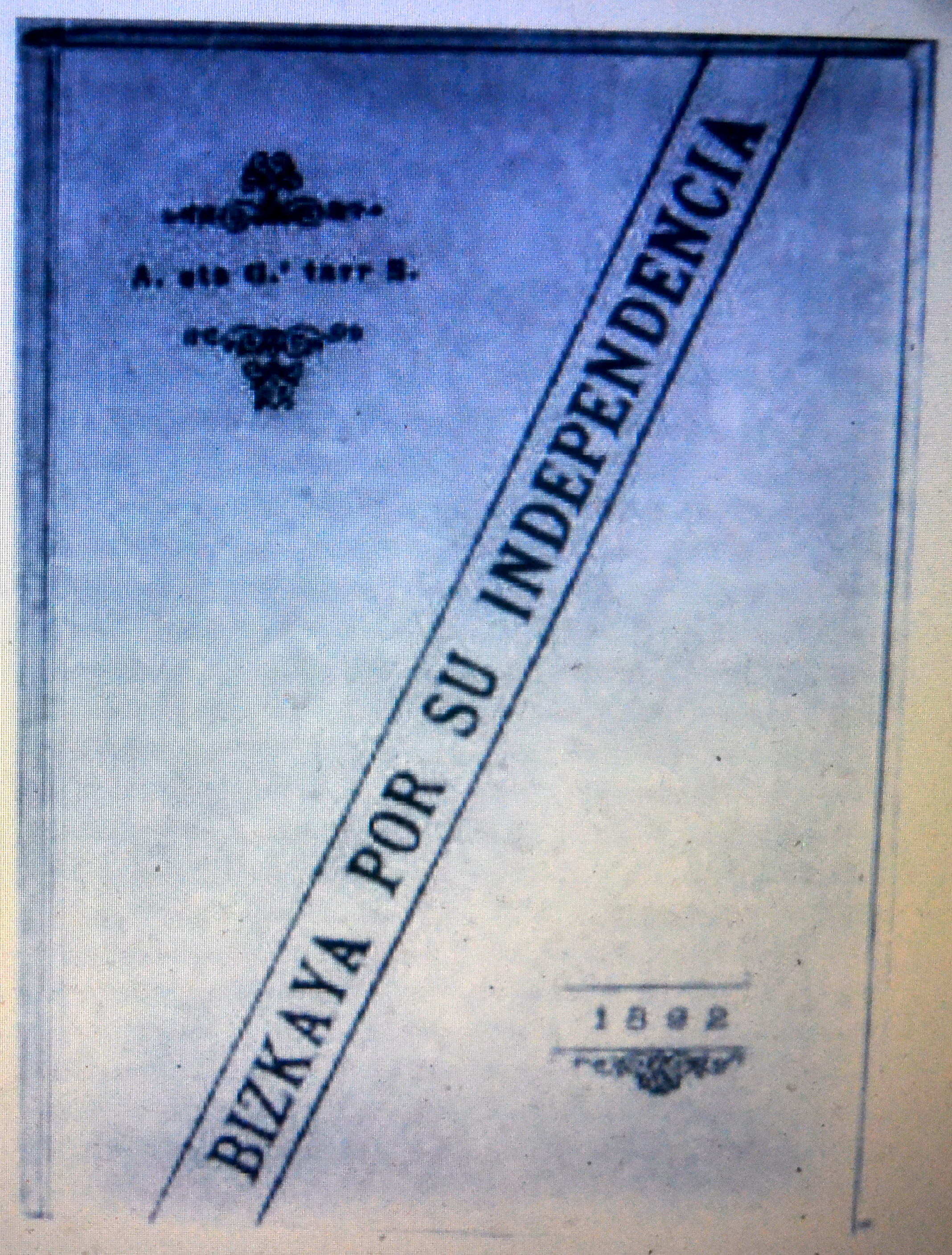 Bizkaia bere independentziaren alde (Sabin Arana Goiri, 1892) - Biscay for its independence (Sabino Arana Goiri, 1892)